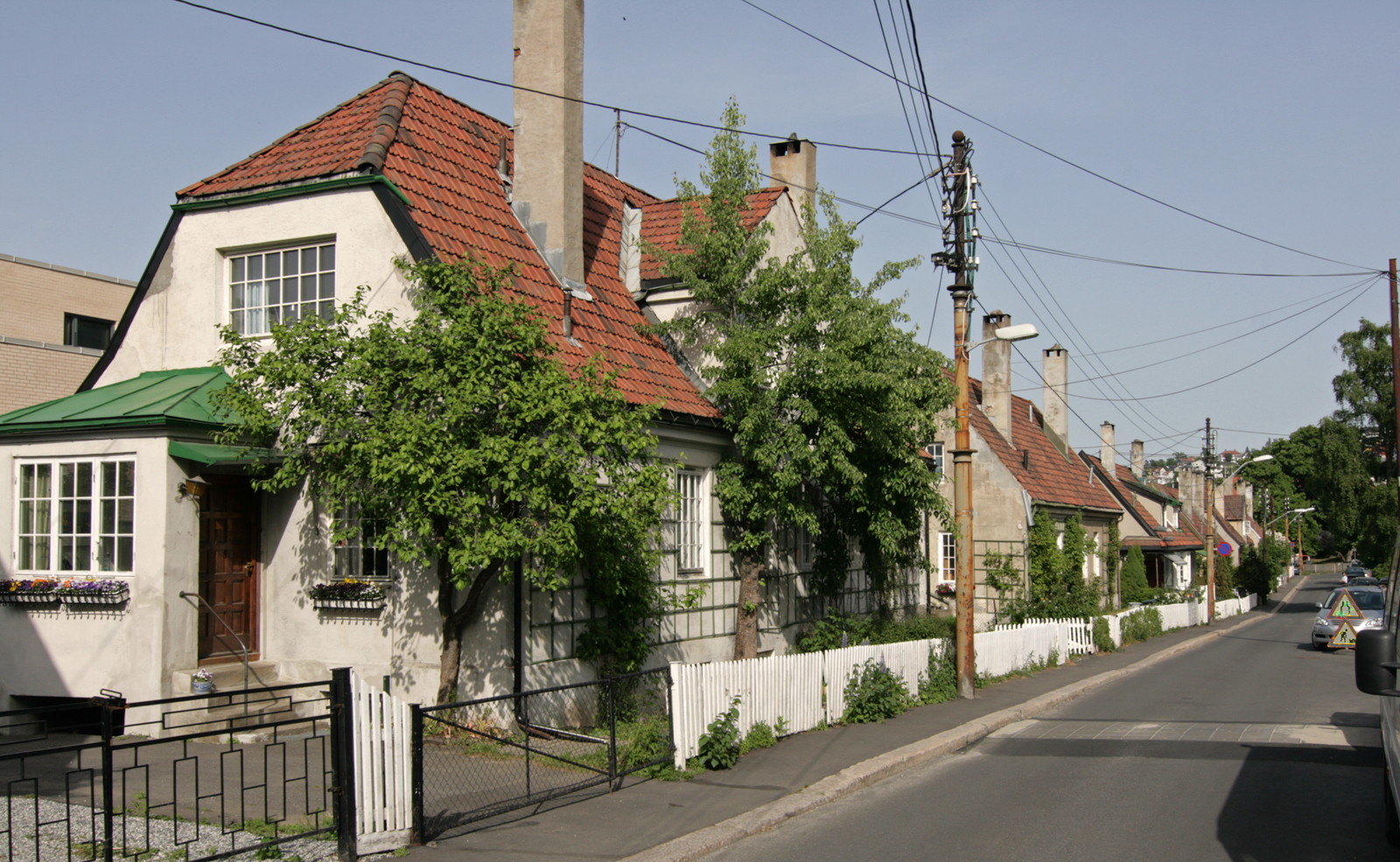 Svingen, Oslo. Del av Arctanderbyen.